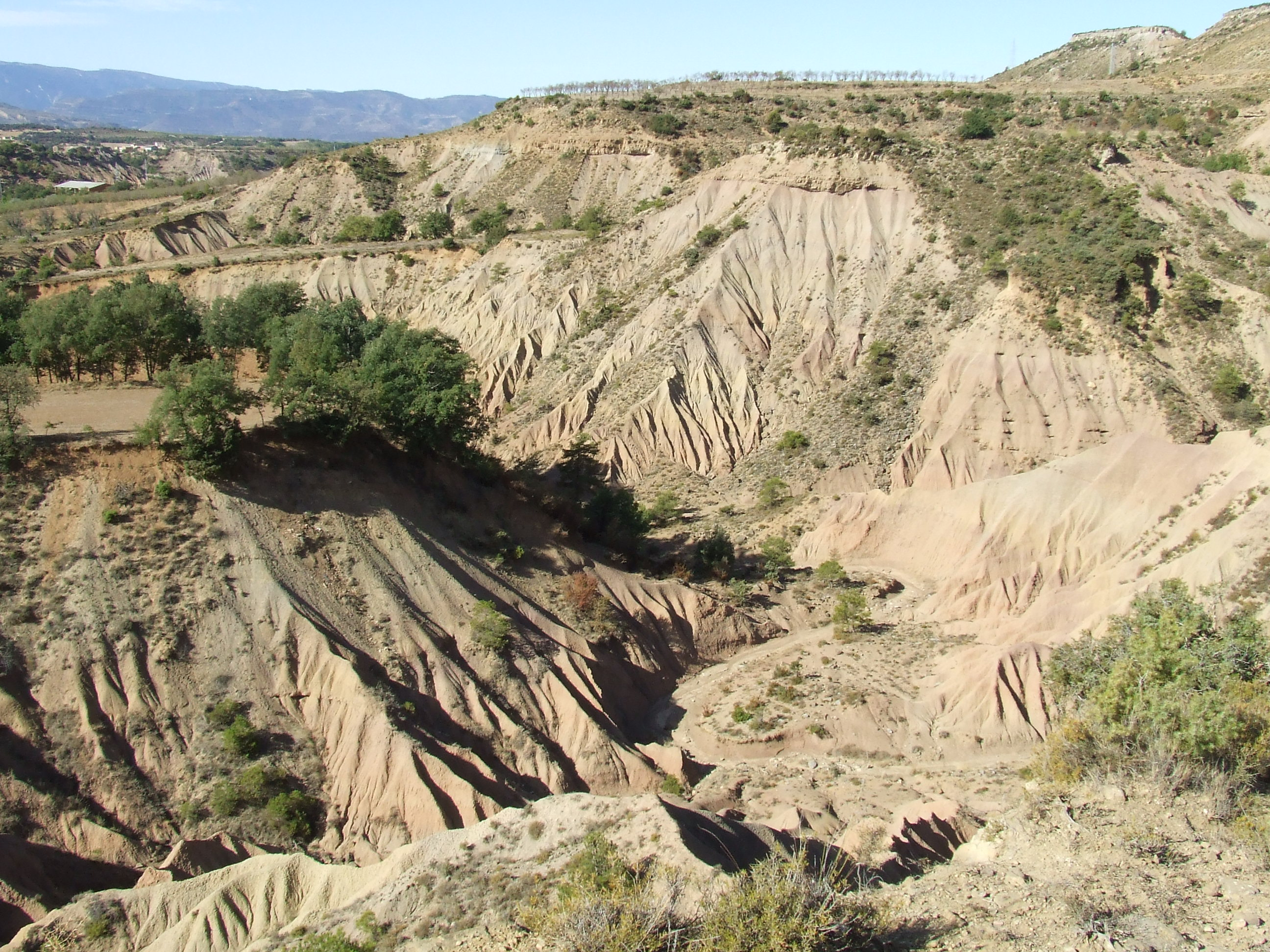 La Llau del Gassó (Abella de la Conca, Pallars Jussà)